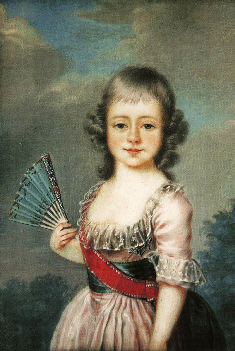 Портрет великой княжны Екатерины Павловны. ГМЗ "Павловск". ЦХ-2871-/1-ХI.